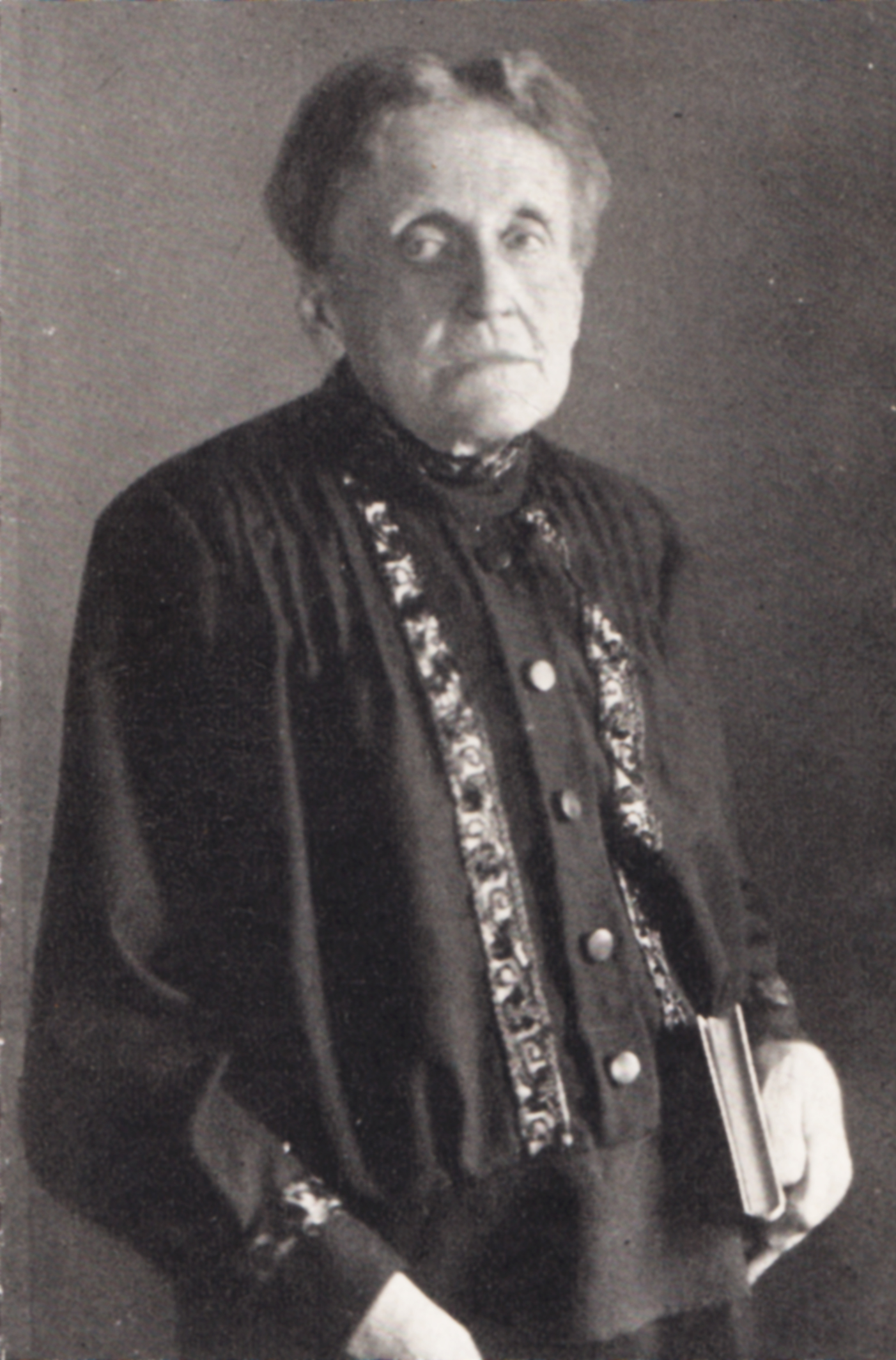 Reproduktion eines Fotos aus den "Aufzeichnungen einer Achtzigjährigen aus ihrem Künstlerleben und aus ihrer Heimat" von Gustava Bley